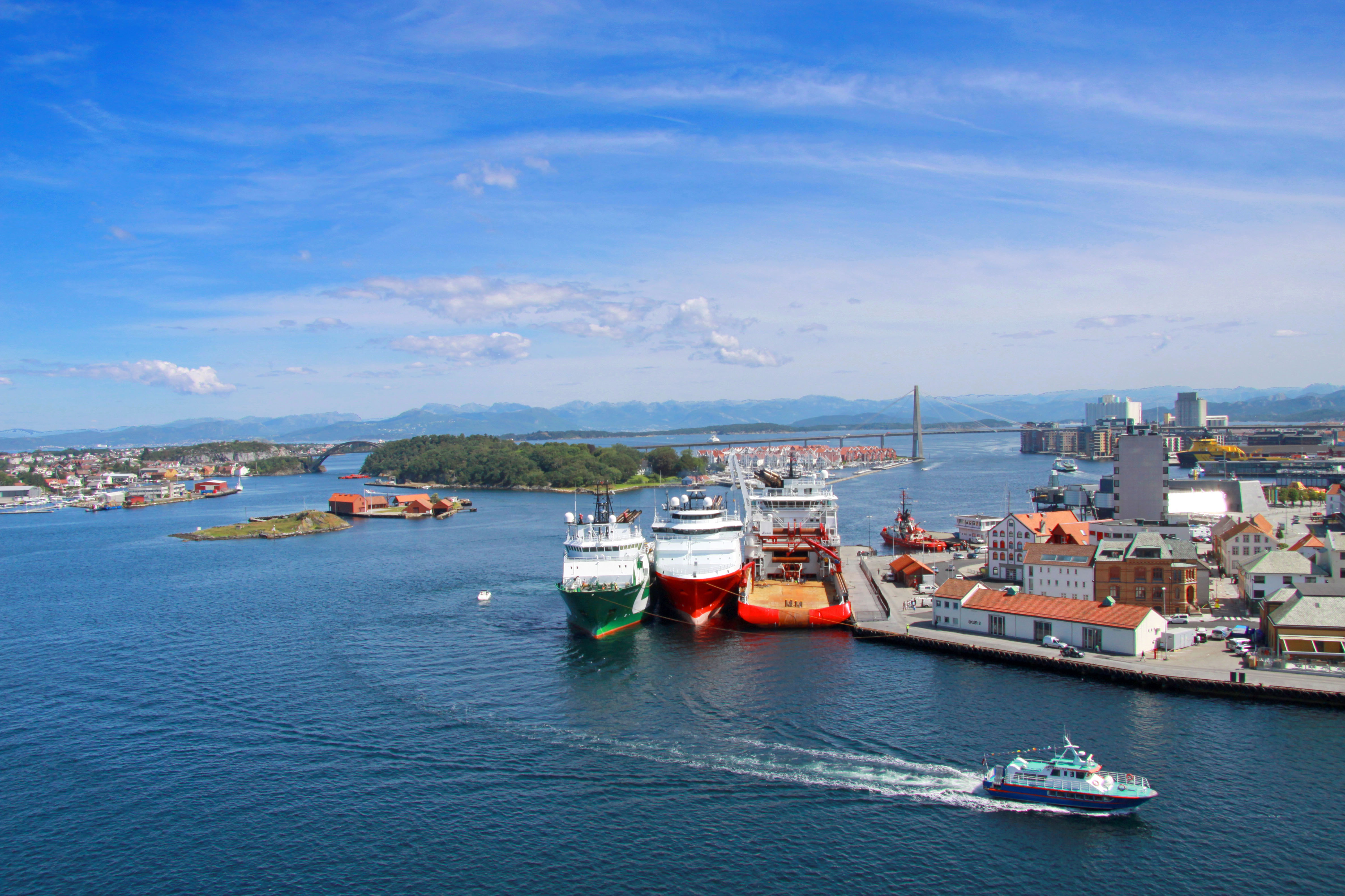 Stavanger. Le port vu du bateau.